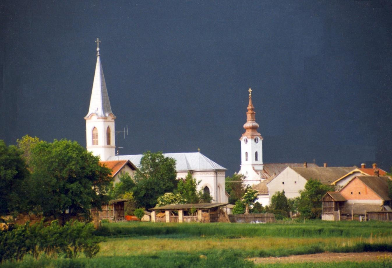 Српски (ћирилица): Римокатоличка и гркокатоличка црква у Куцури.